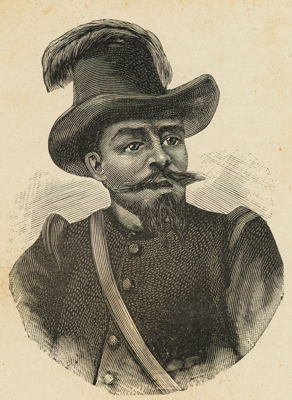 Henrique Dias: Cabo dos homens pretos na guerra com os Hollandezes em Pernambuco em que fez prodígios de valor e perdeu um braço. Fallecido a 8 de junho de 1662 no Recife, sua pátria